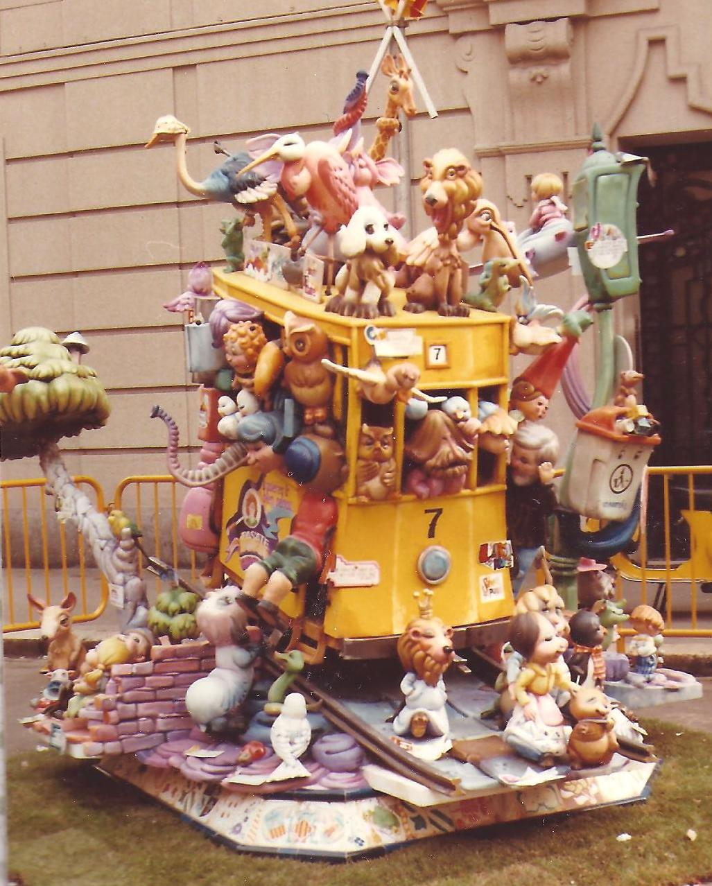 Falla infantil Castelló-Segorb 1984 (fotografia cedida per l'artista faller)